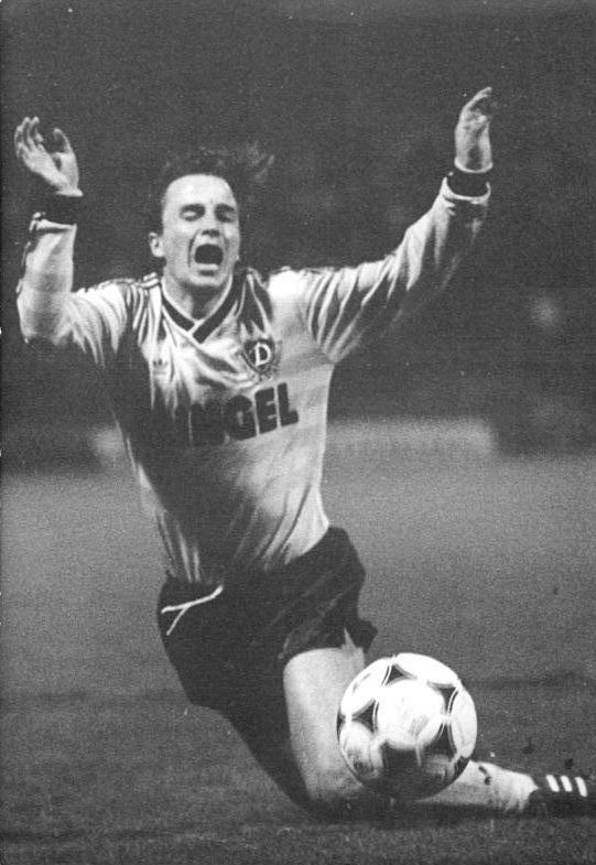 ADN-ZB-Häßler -23.3.1990-Le- Dresden: Fußball-Oberliga-Punktspiel SC Dynamo Dresden - FC Carl Zeiss Jena- Der Sturz des Dresdner Mittelfeldspielers Jörg Stübner ist symbolisch für den gesamten Spielverlauf. Mit 4:0 spielte die Mannschaft aus Jena den Tabellenführer in Grund und Boden.